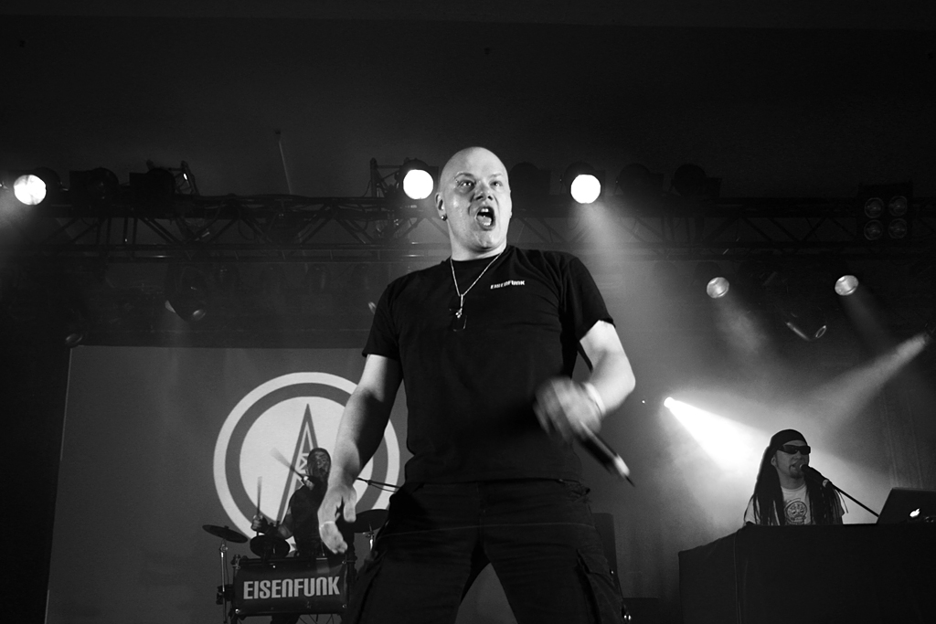 Eisenfunk auf dem Amphi Festival 2012